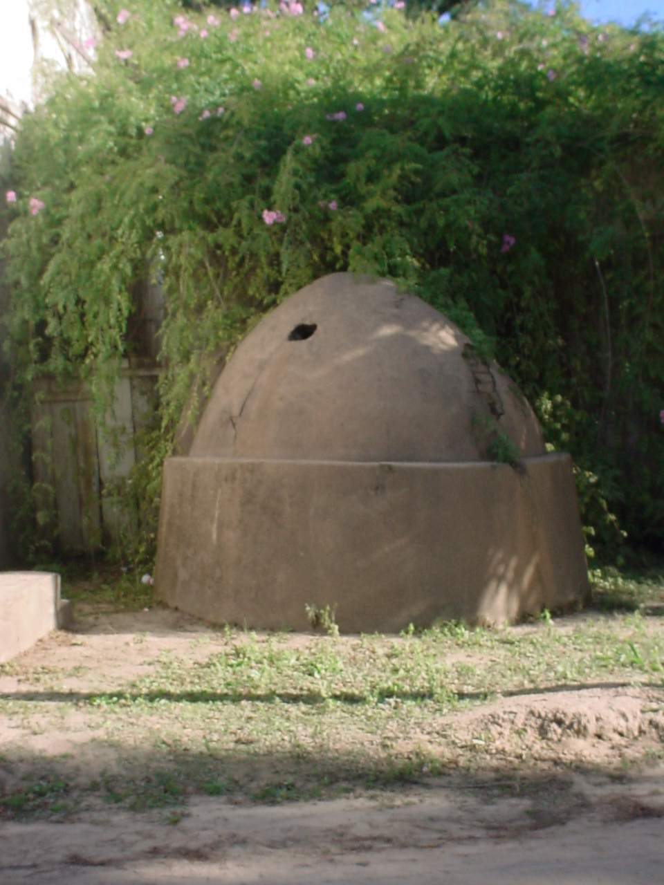 Cisterna construída por imigrantes alemães no sul do Rio Grande do Sul